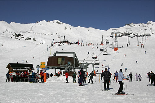 La Chaux (2260 m.ü.M) mit Blick zu Les Attelas